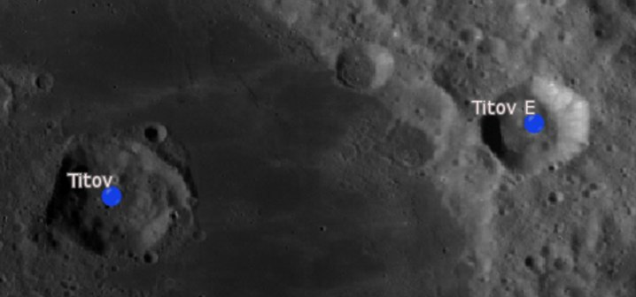 Cráter lunar Titov. Cráteres satélite. (Imagen LRO)